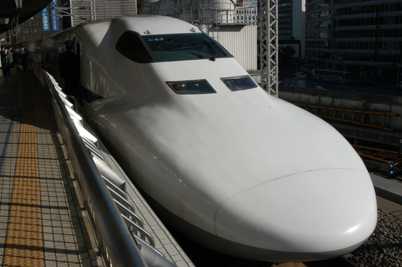 Shinkansen in Tokyo, 2005